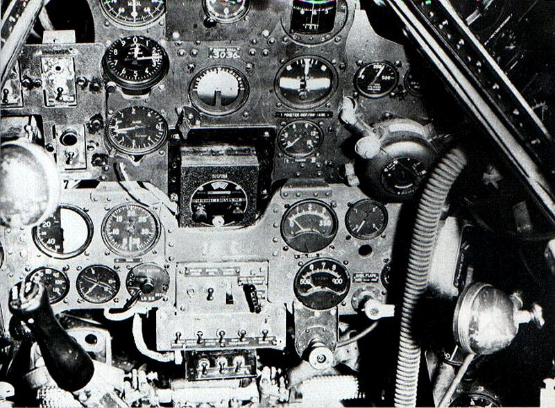 Instrument panel of a Yokosuka D4Y4 "Suisei".